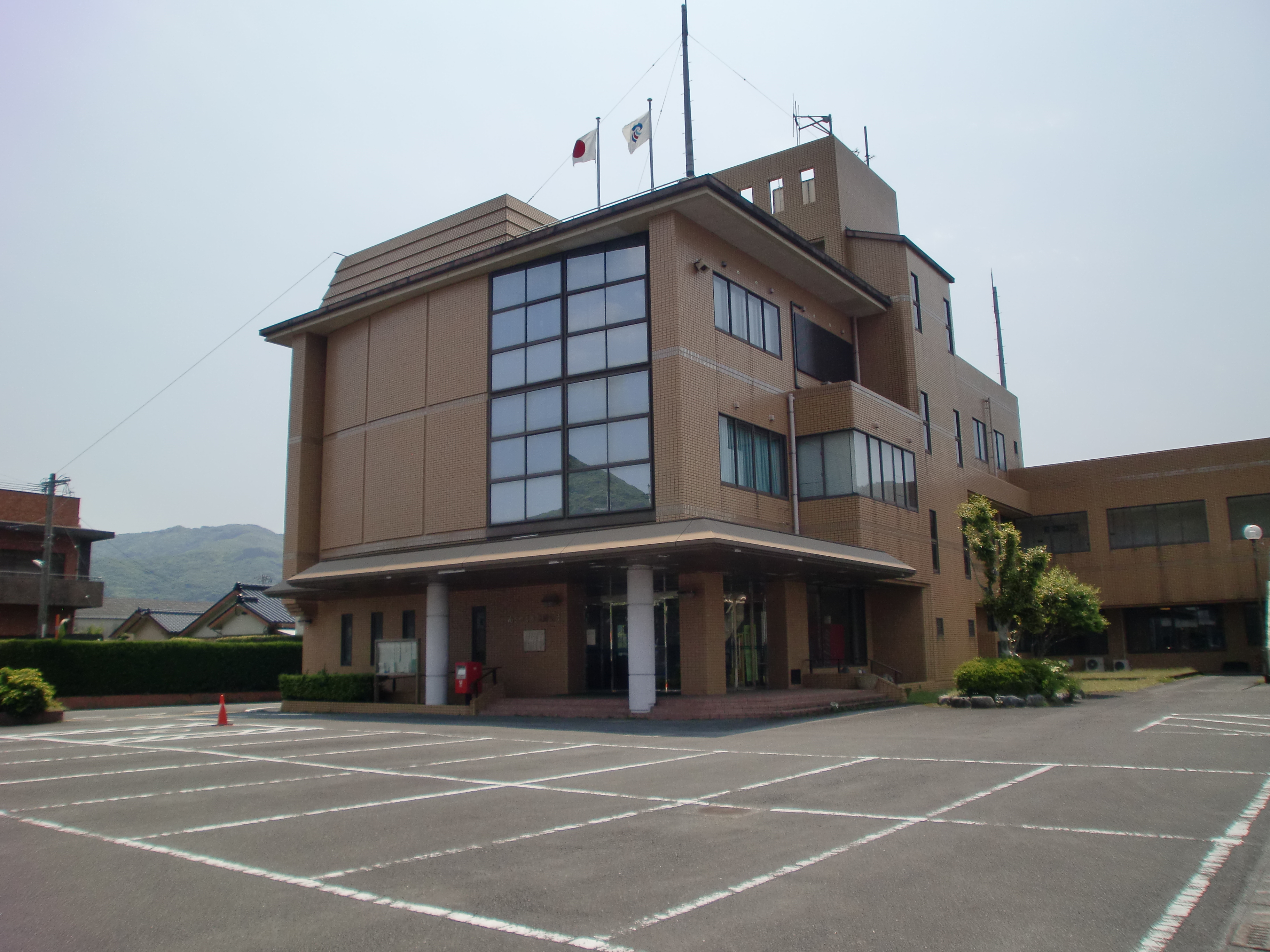 南さつま市役所大浦支所（旧・大浦町役場）の外観。